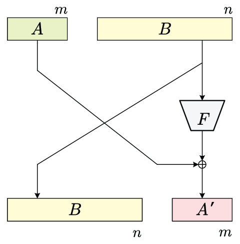 רשת פייסטל כללית בלתי מאוזנת